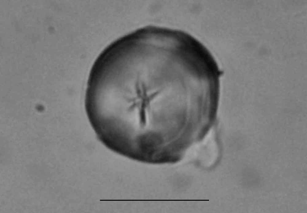 Grano de almidón de marunguey (Zamia amblyphyllidia) recuperado en herramienta lítica. Sitio Utu-27, Puerto Rico (ca. 1,100 D.C.) Stärkekorn von Zamia amblyphyllidia